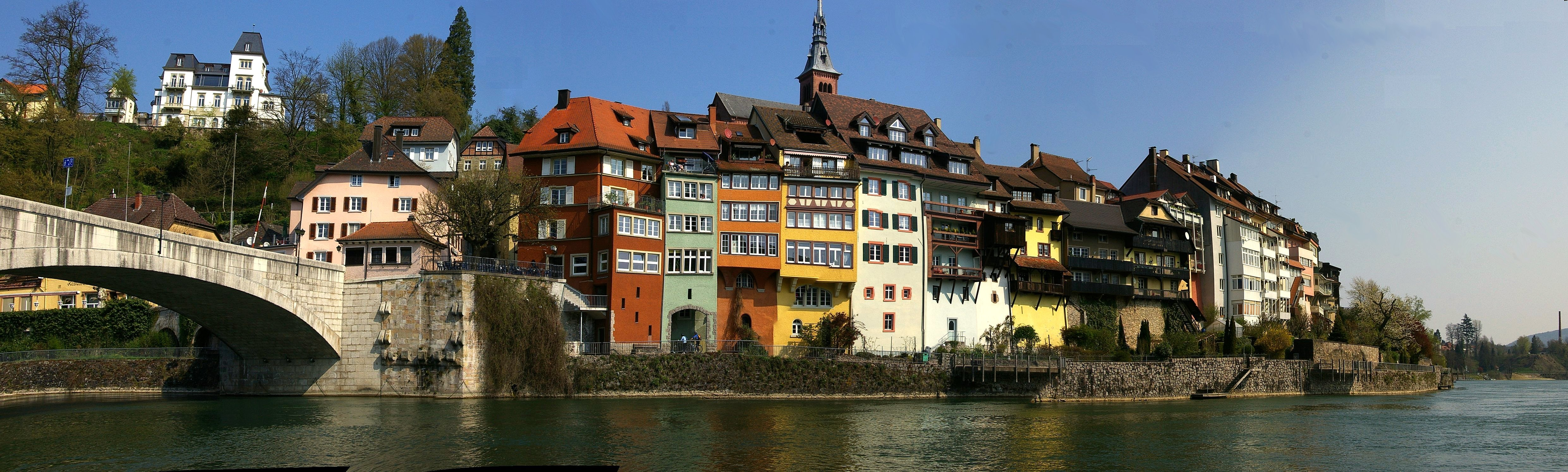 Laufenburg (Baden) deutsche Seite